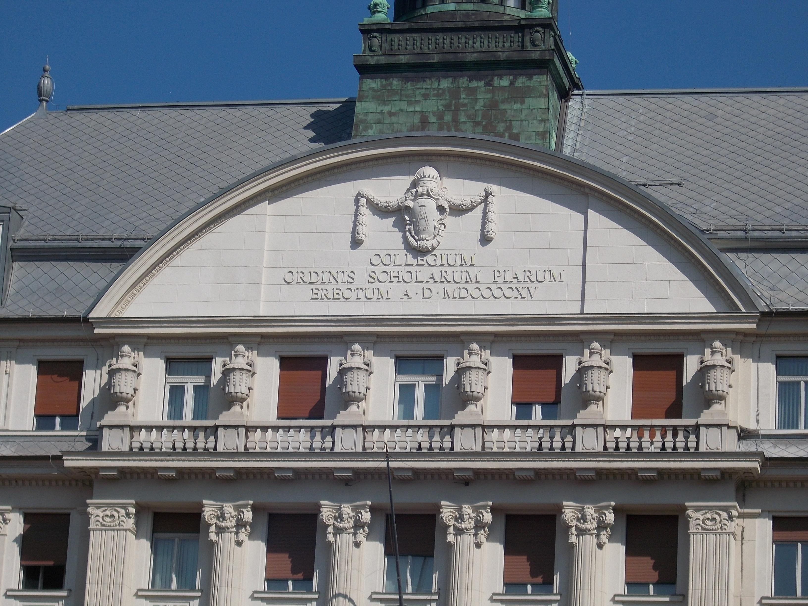 Budapesti Piarista Gimnázium, részlet. - Budapest, Március 15. tér